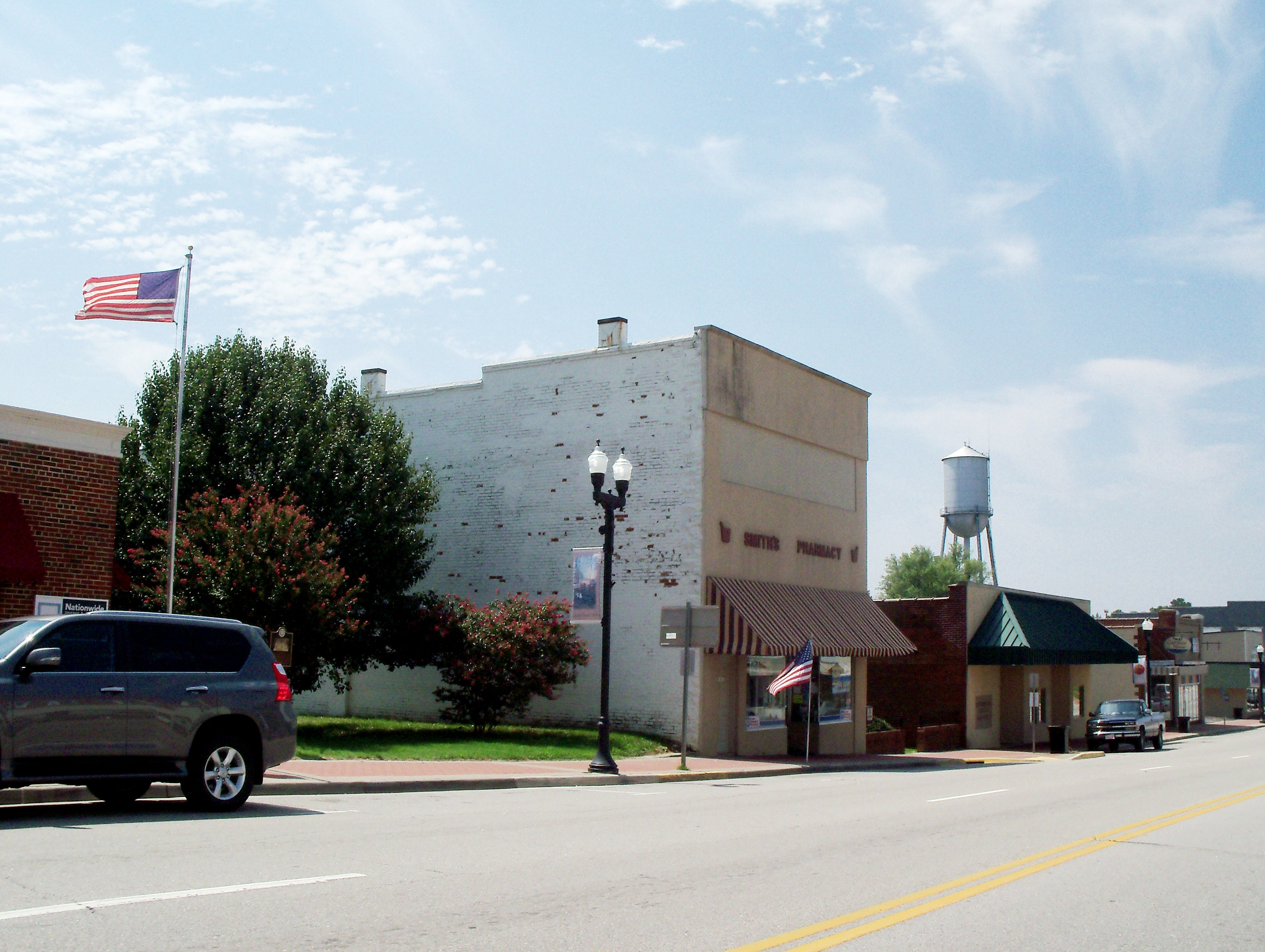 Kenbridge, VA 23944, USA